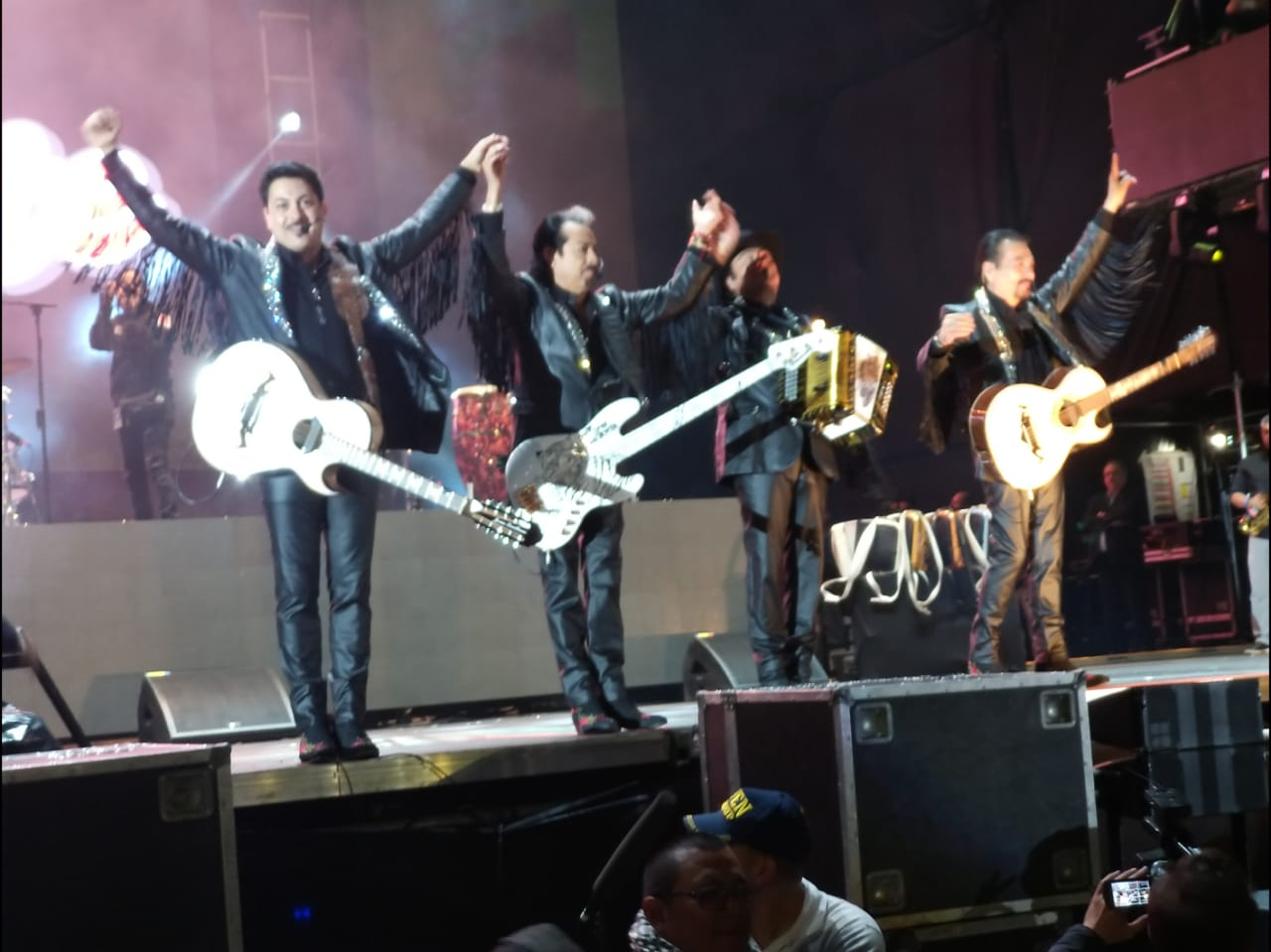 Los Tigres del Norte en Bogota.